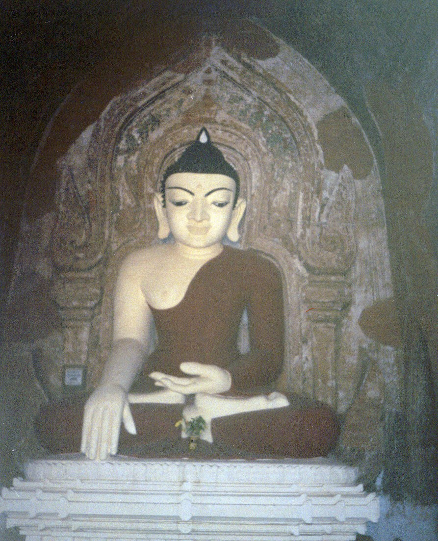 Будда в одном из паганских храмов